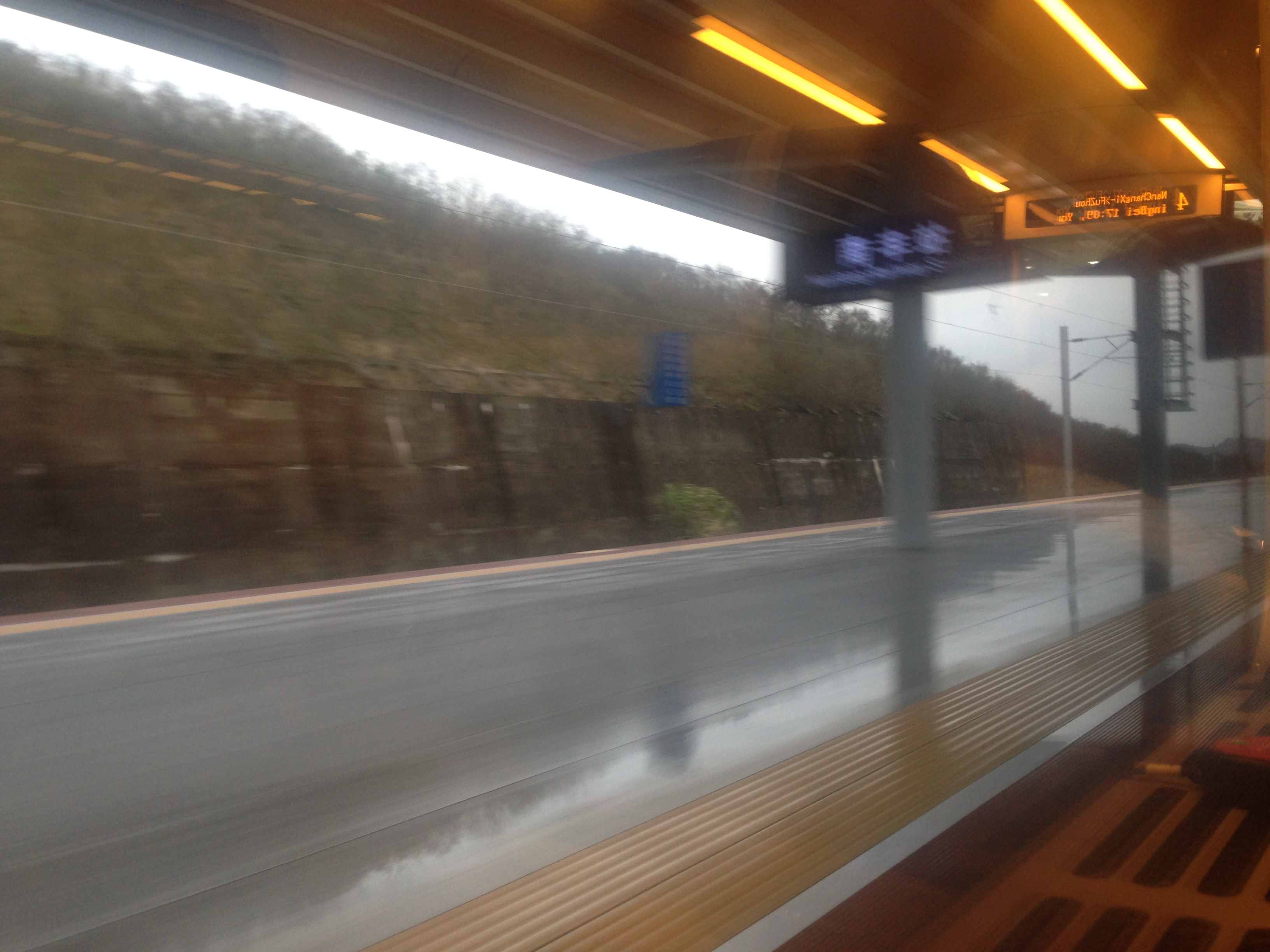 南丰站的站台